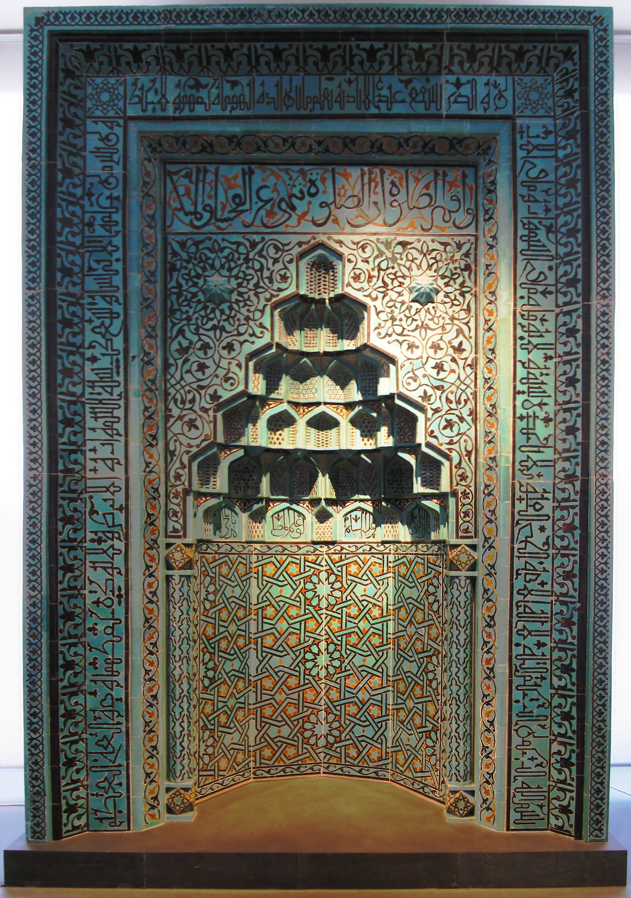 Taht ayet (Suresi 2, ayet 255) Türkiye, Konya mihrap. 3. çeyrek 13. yüzyıl. Beyhekim Cami Fayencemosaik itibaren. Yat 1. 7193